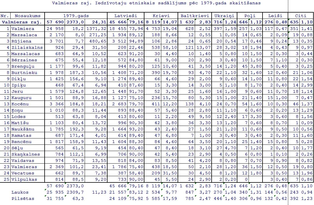 Latvijas 1979. gada tautas skaitīšanas dati